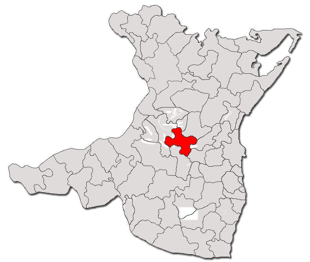 Categorie:Hărţi ale judeţului Constanţa